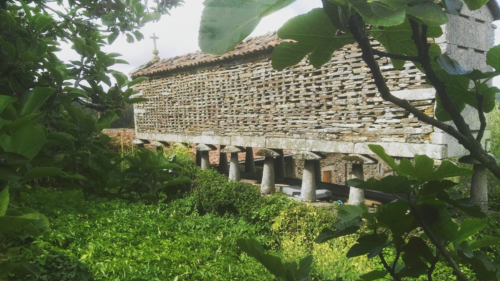 Son moitos os hórreos que podemos ver ao longo da xeografía galega, Coristanco preséntanos una boa mostra deste tipo de construcción tradicionais, como este de Casa Caamaño en Cereo Vello (Cereo).